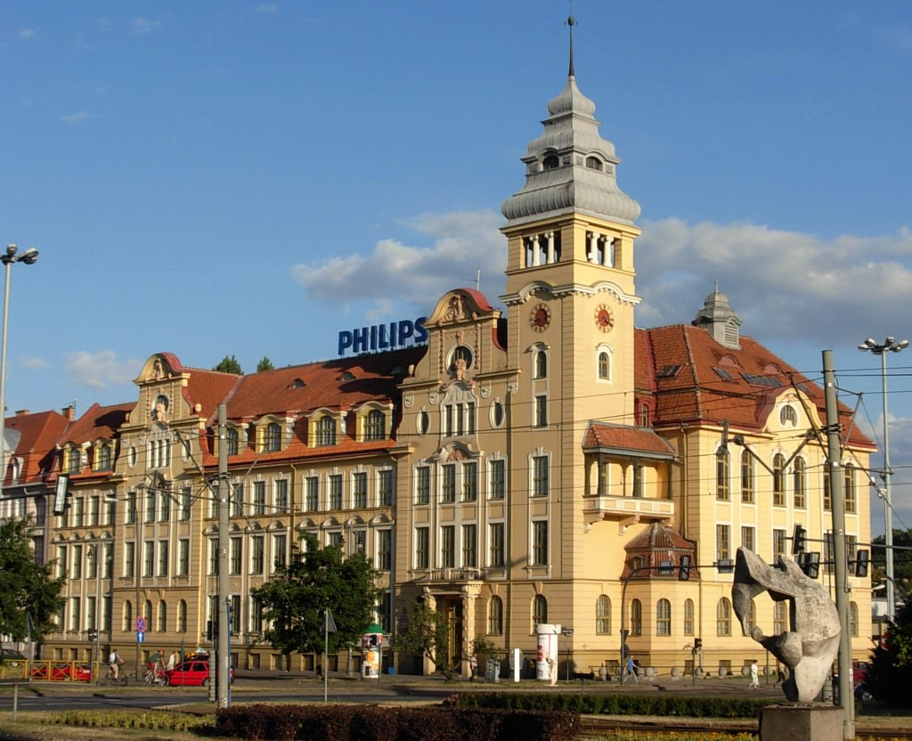 Gmach Technikum Mechanicznego w Bydgoszczy